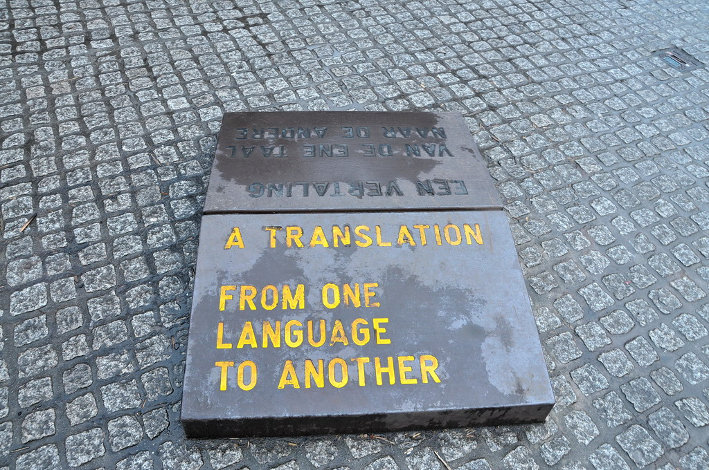 From One Language To Another (1969). 'Een vertaling van de ene taal in een andere'. Vlakbij dit 'woordenboek liggen nog 2 van deze kunstwerkjes, zij het in een andere taal. Artist: Lawrence Weiner (1942 New York). Spui, Amsterdam/The Netherlands